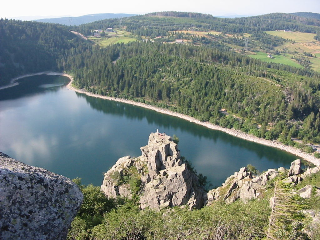 Le lac Blanc Dans le massif des Vosges, près d'Orbey. Photographie personnelle prise le 28 juillet 2005.